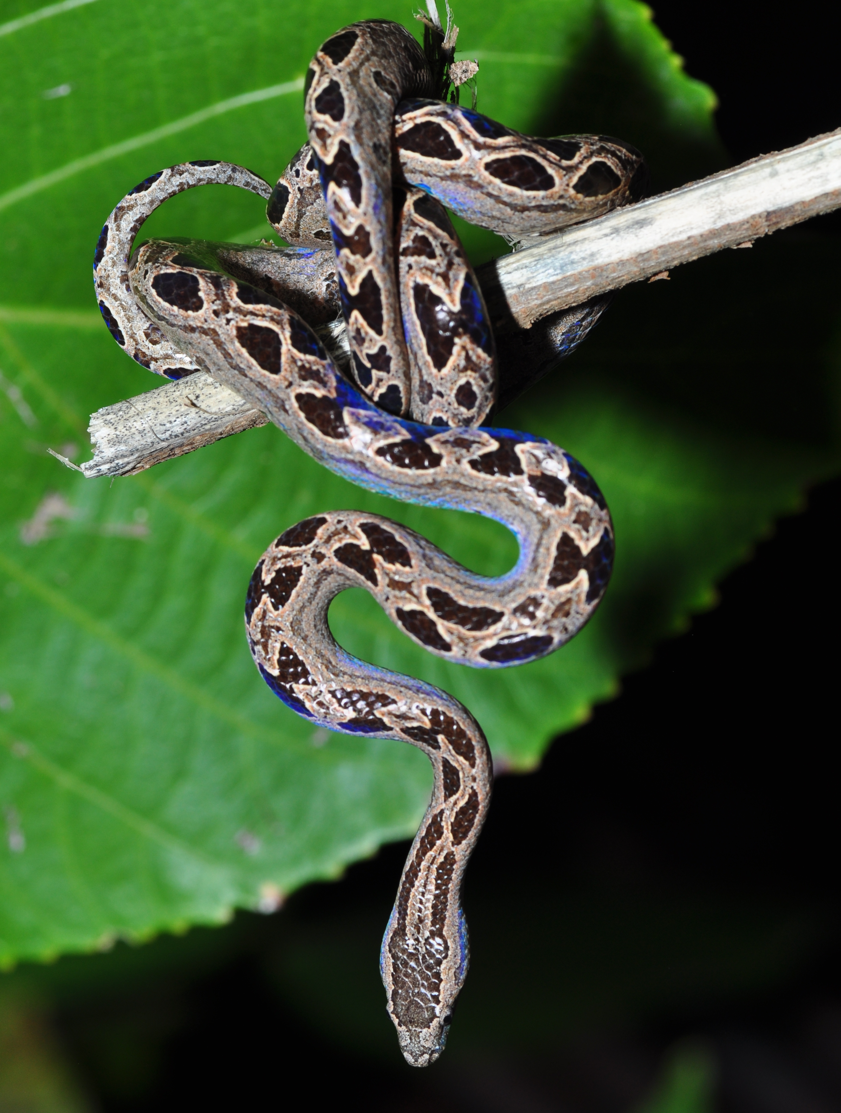 Карликовый панамский удав